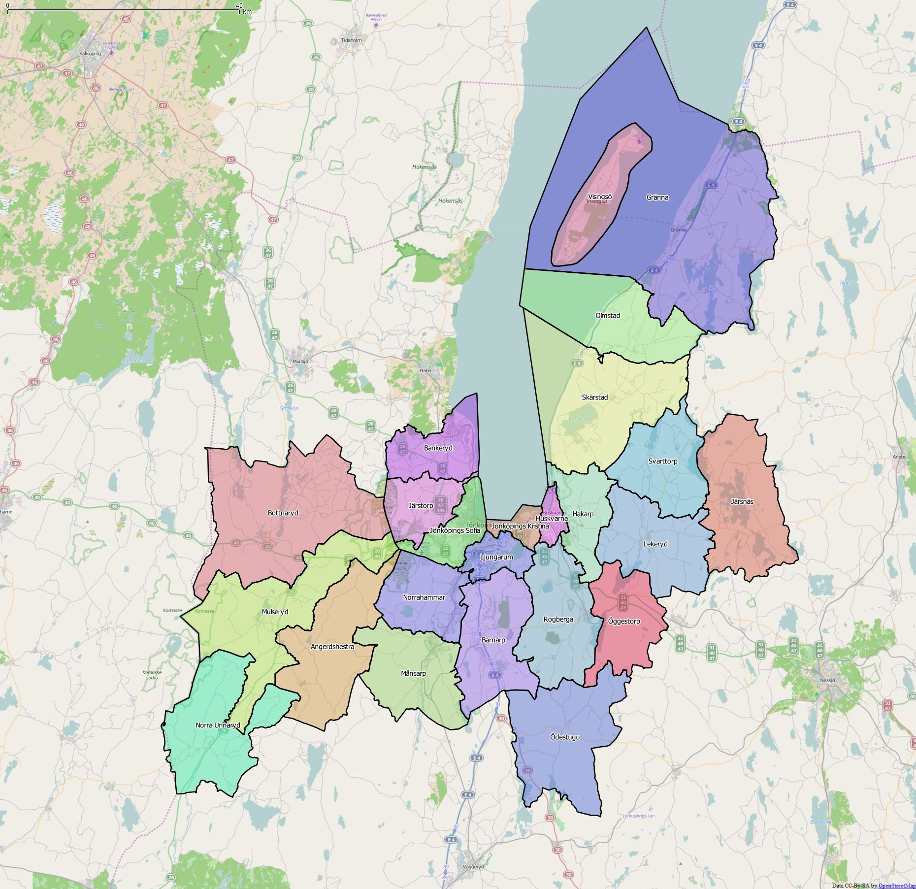 Distriktsindelningen i Jönköpings kommun